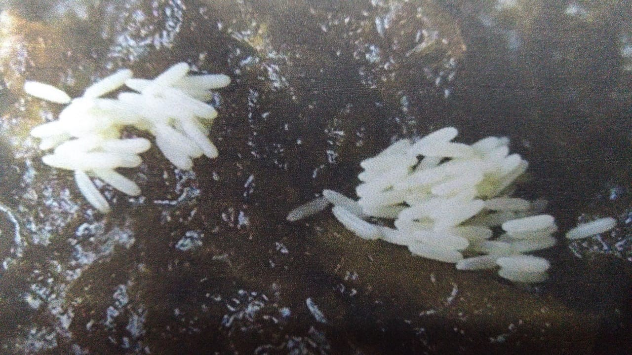 Telur lalat